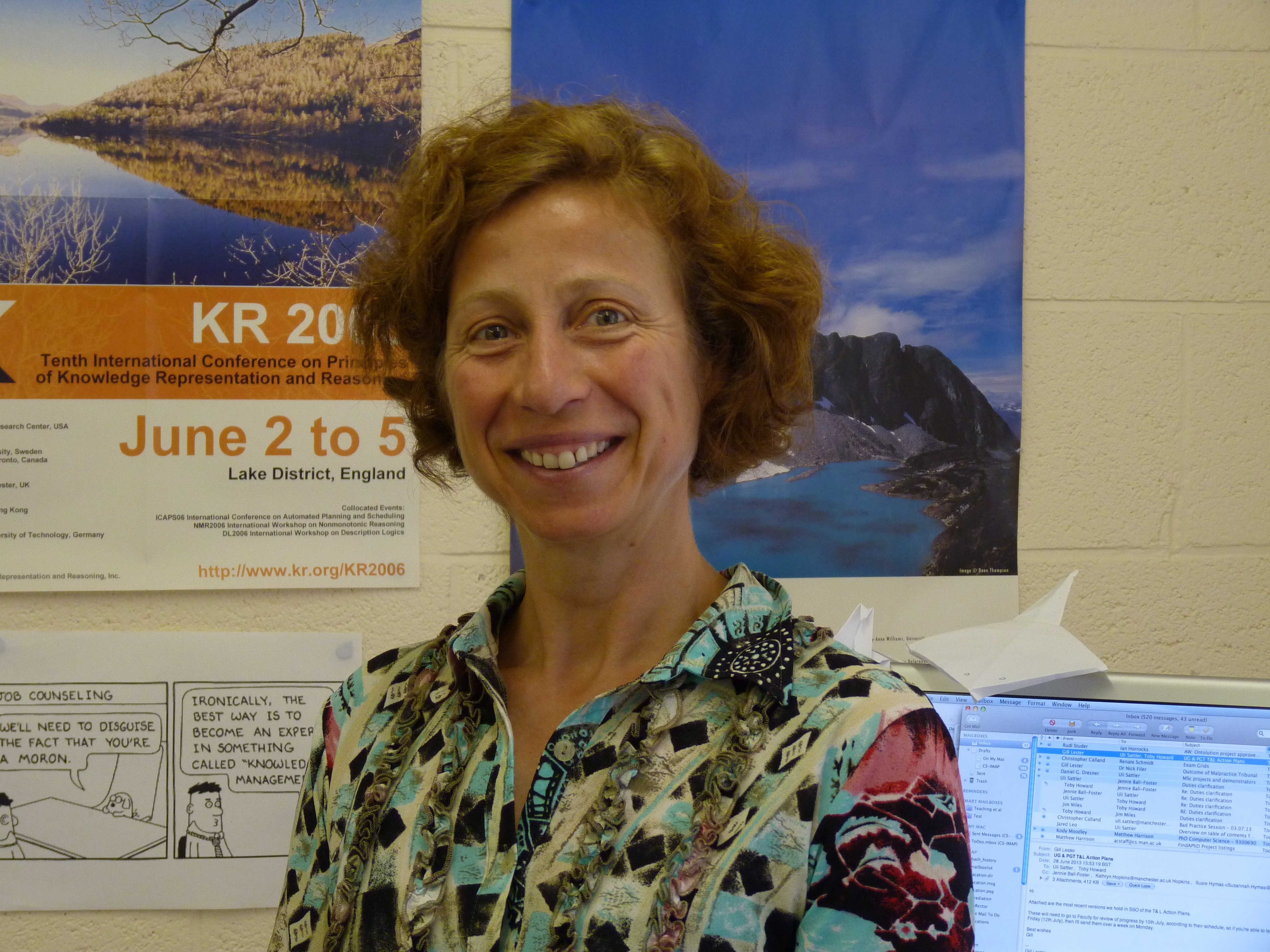 Ulrike Sattler P1010617